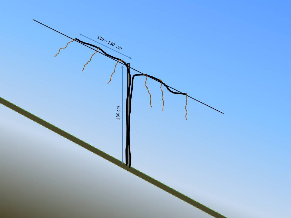 Steirischer Bogenerziehung